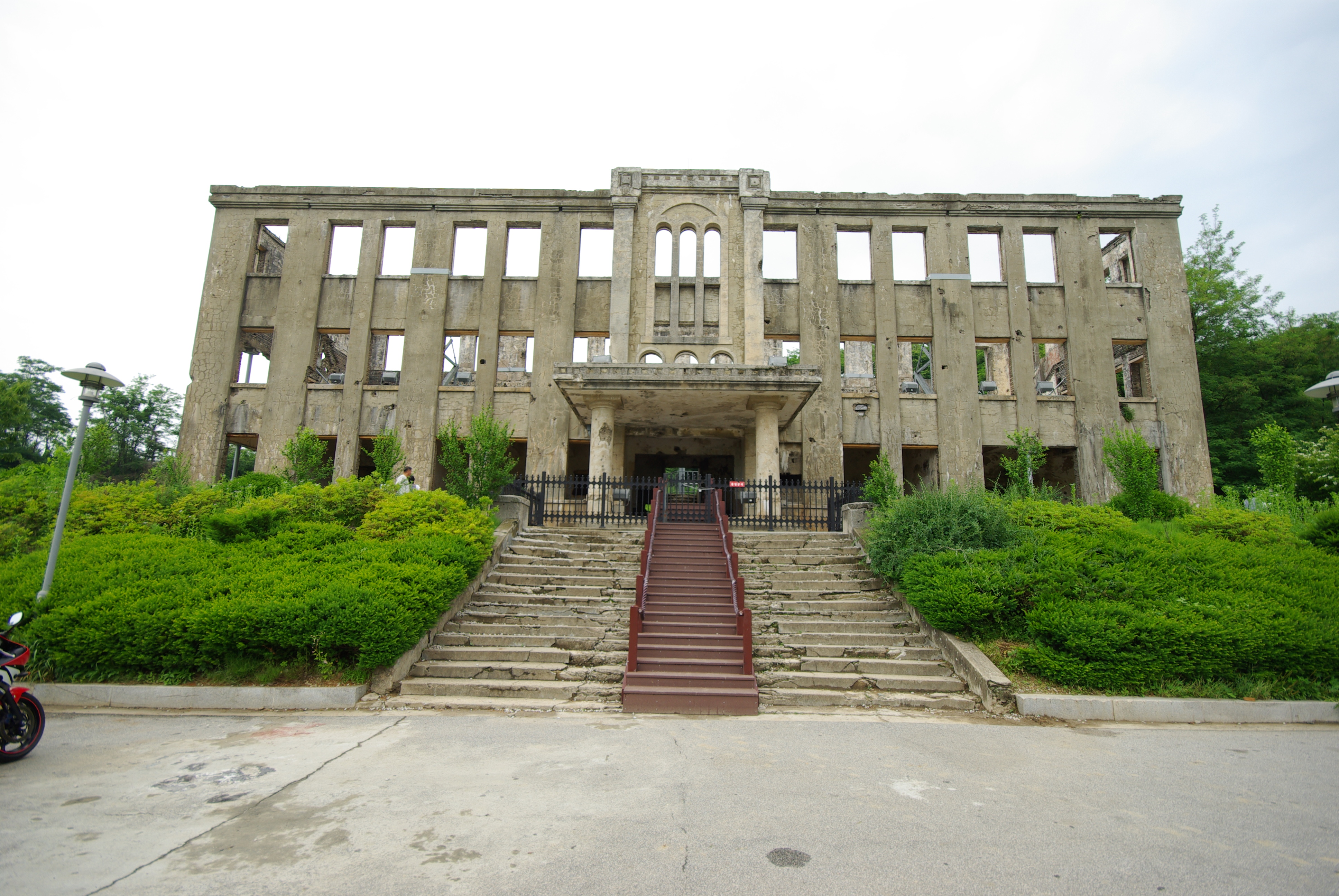 철원노동당사 정면